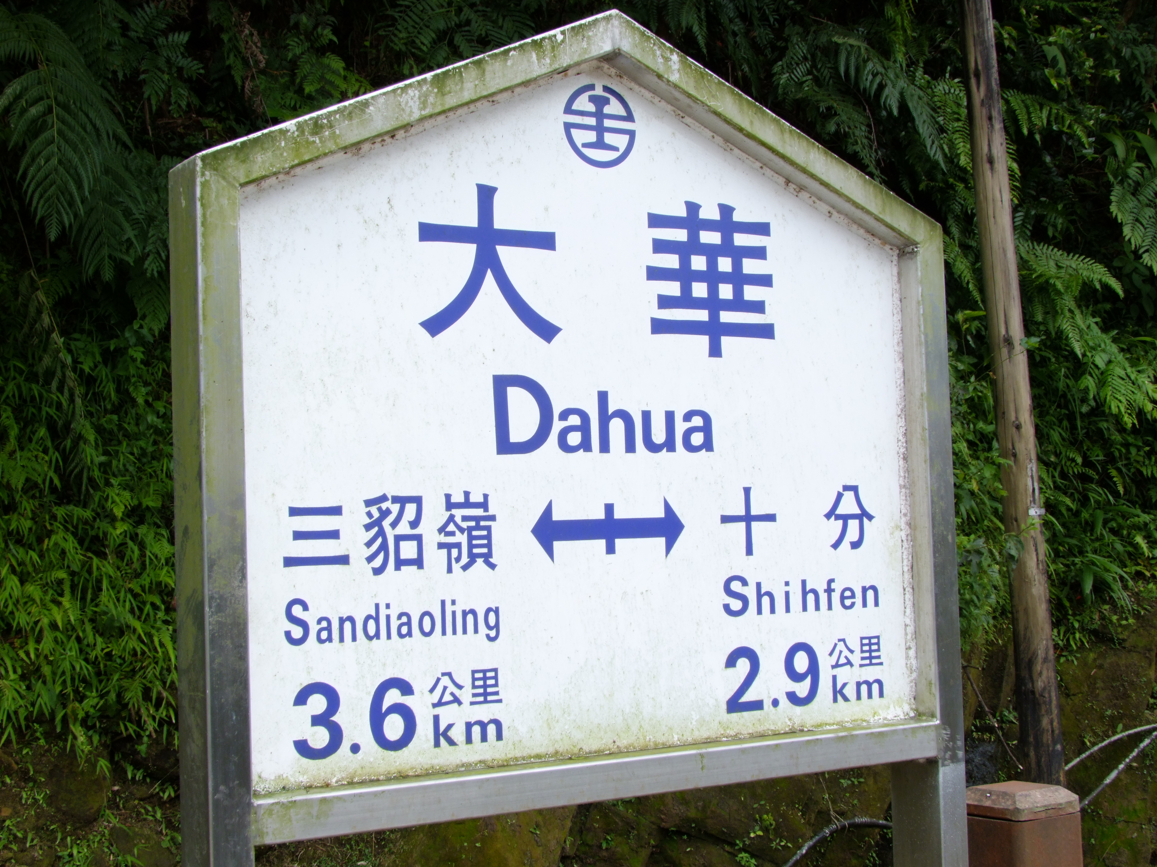 臺灣鐵路管理局大華車站月台路線標示牌。